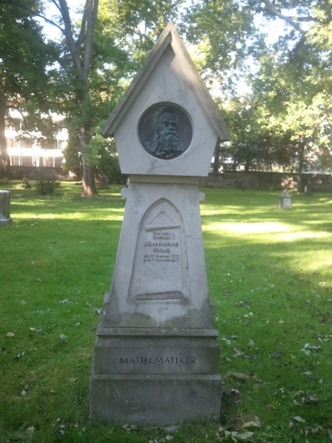 מצבתו של אלפרד קלבש בבית הקברות ברתולמיאו בגטינגן